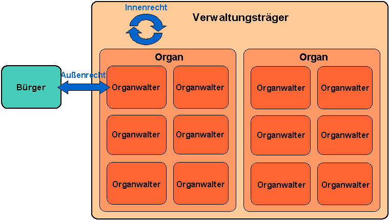 Schaubild Verwaltungsträger Autor: C.Löser Erstellt mit: de: Draw